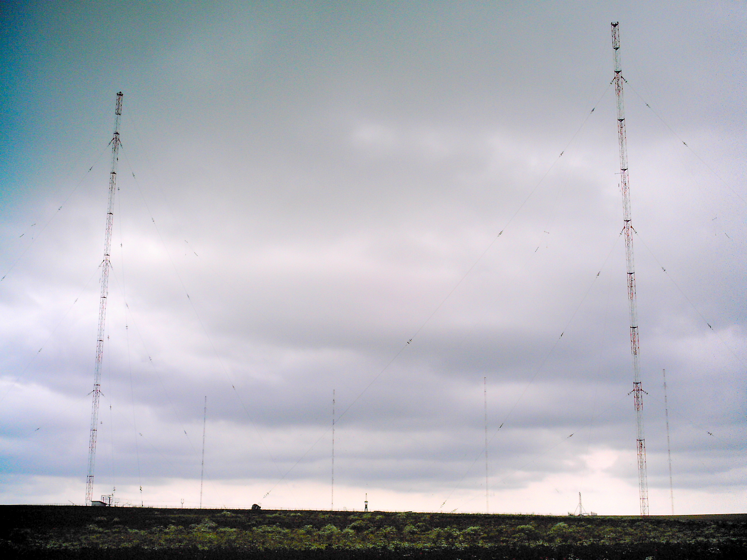 Photo 5. Deux antennes de réserve au premier plan, quatre antennes principales au deuxième plan.